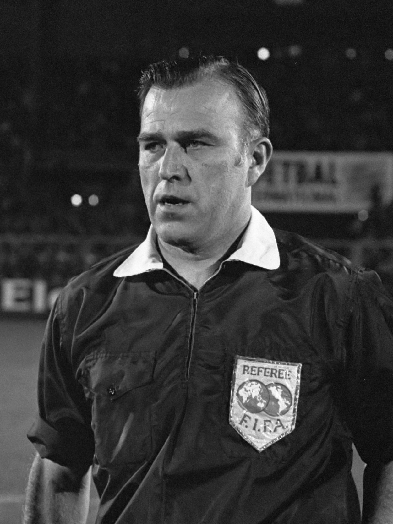 Ajax tegen Real Madrid 2-1, halve finale Europacup I, scheidsrechter R. Glöckner (midden) en grensrechters 11 april 1973